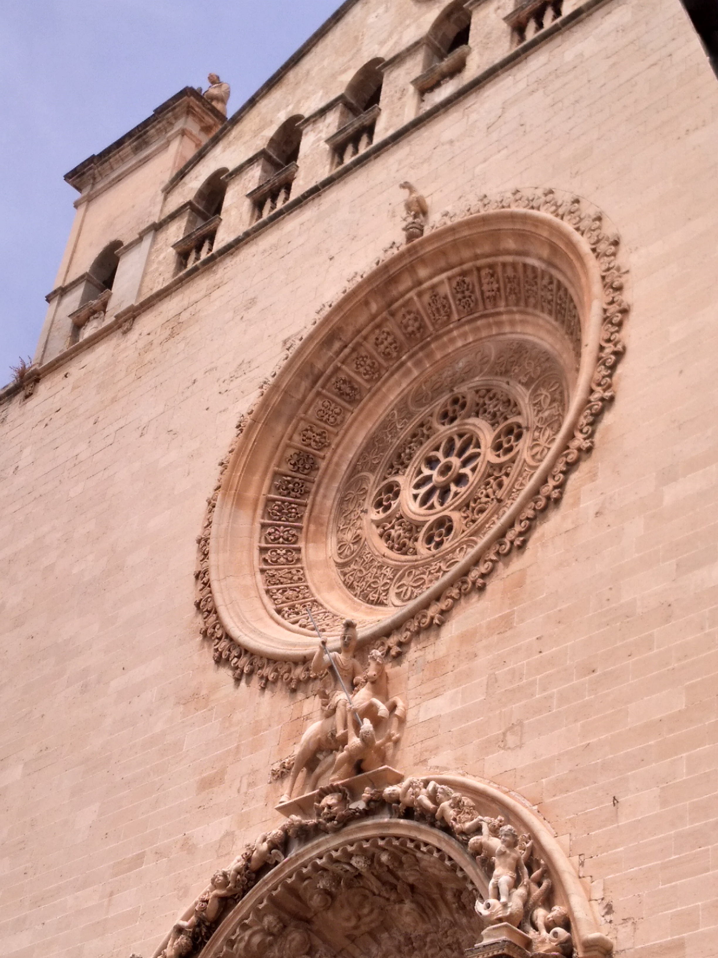 Rosace de l'église San Francesc à Palma